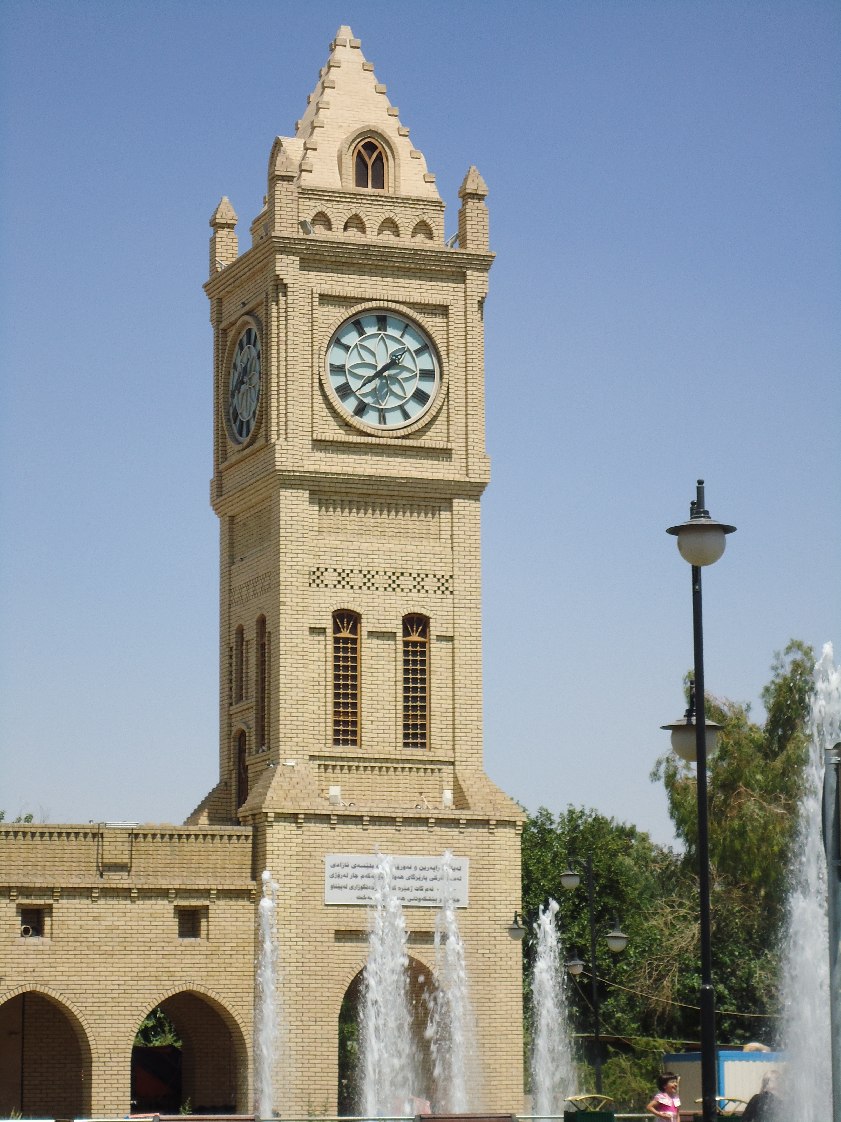 کوردی: کاتژمێرەکەی پارکی شار، ھەولێر